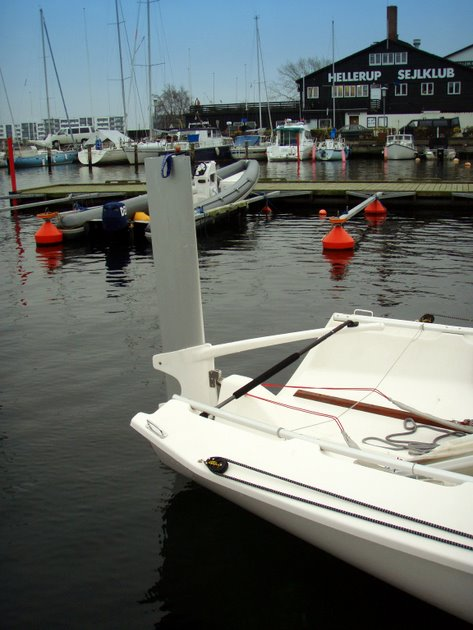 Hellerup Sejlklub, som den så ud en dag i november 2006.